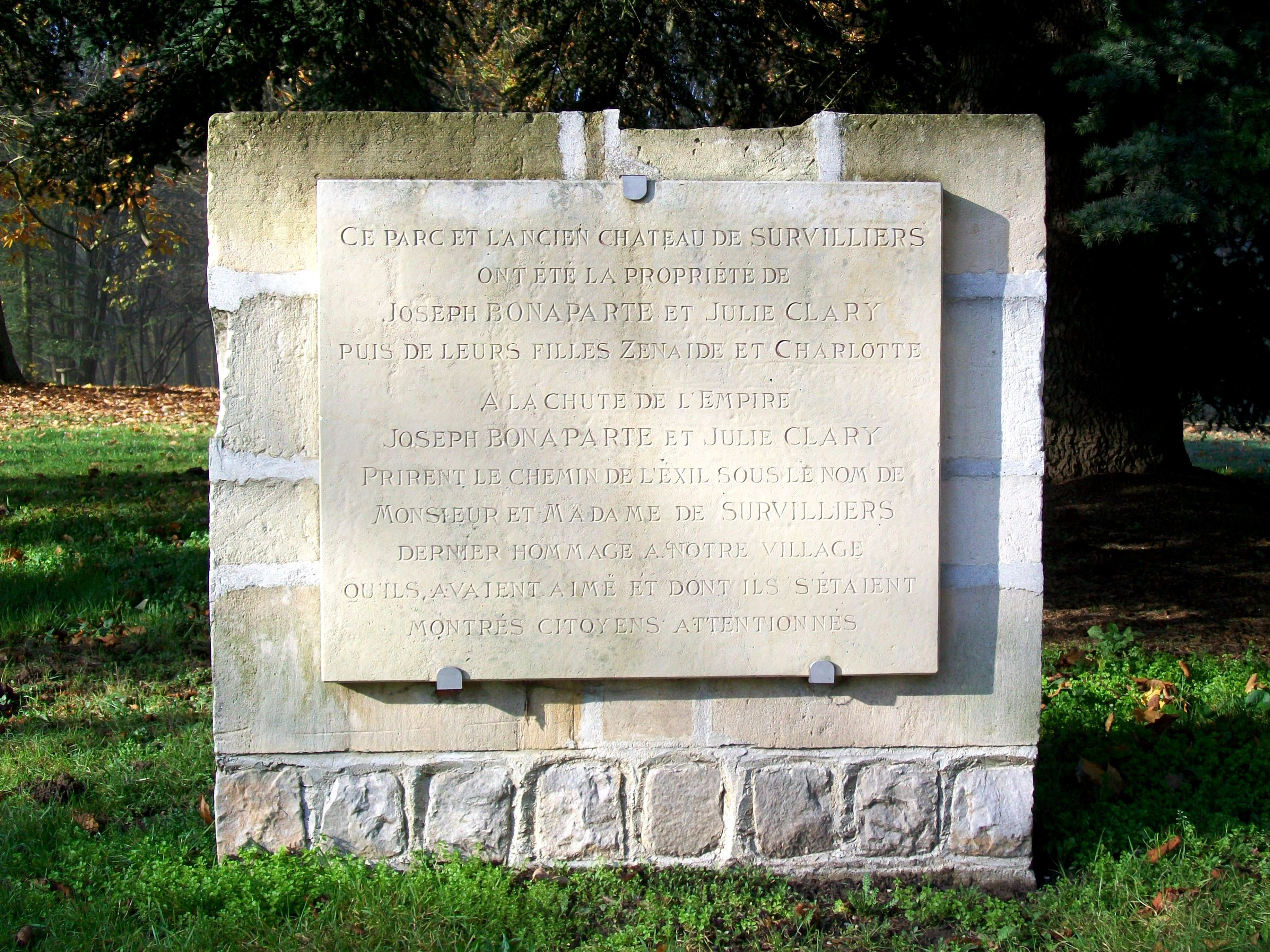 Monument en souvenir de Joseph Bonaparte et Julie Clary, qui furent propriétaire de l'ancien château de Survilliers à partir de 1803